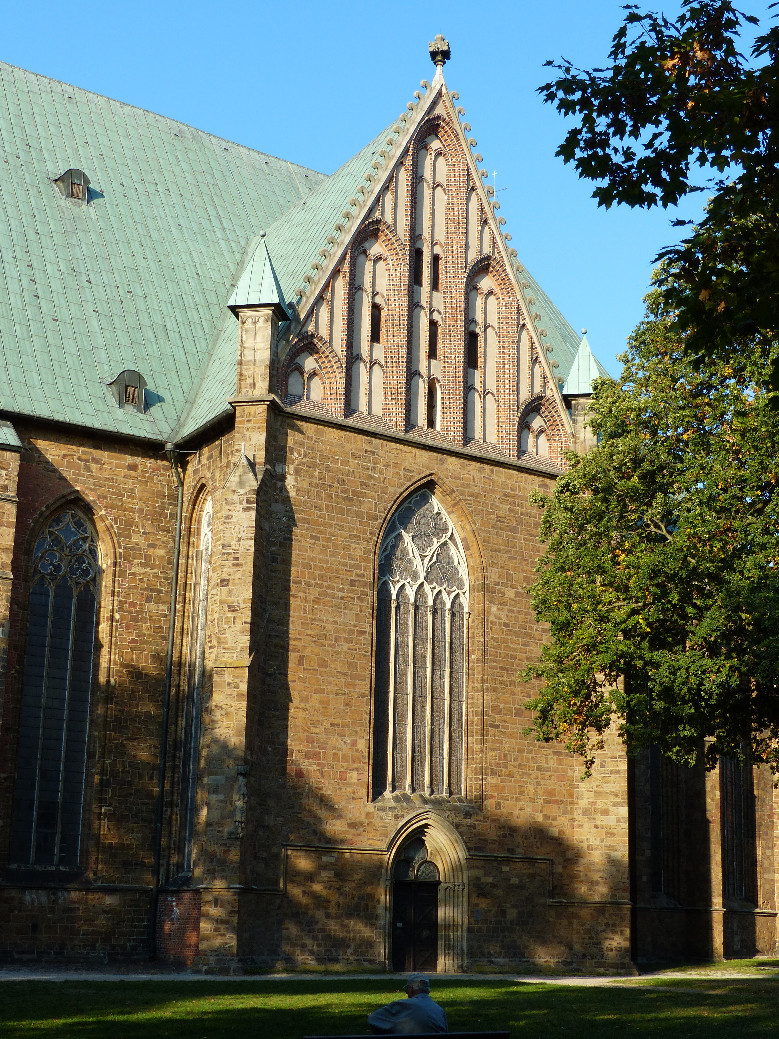 Verdener Dom, südlicher Querhausgiebel